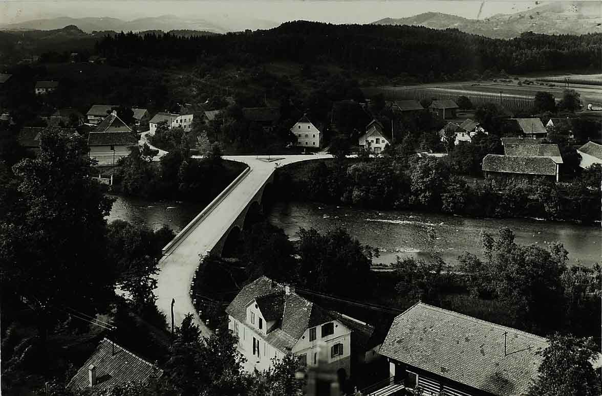 Razglednica Letuša.